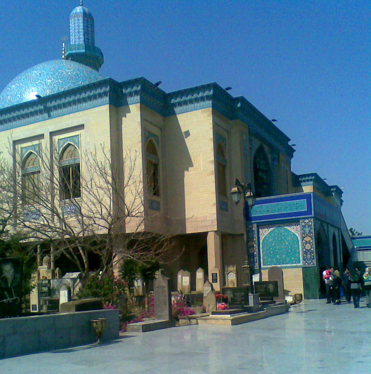 Mir Mövsüm Ağa ziyarətgahı